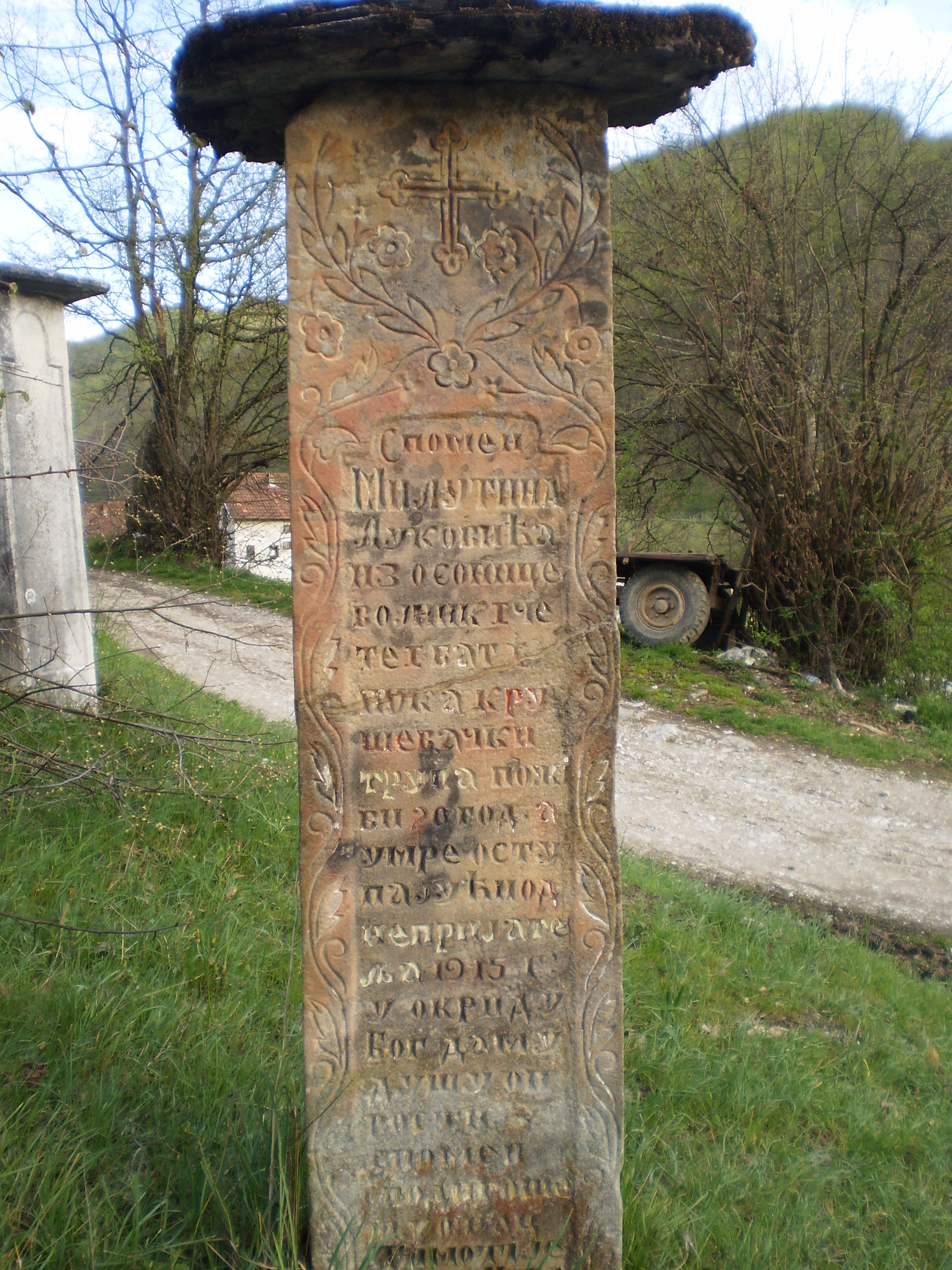 Српски (ћирилица): Споменик (Крајпуташ) Милутину Луковићу, 1915. Селиште